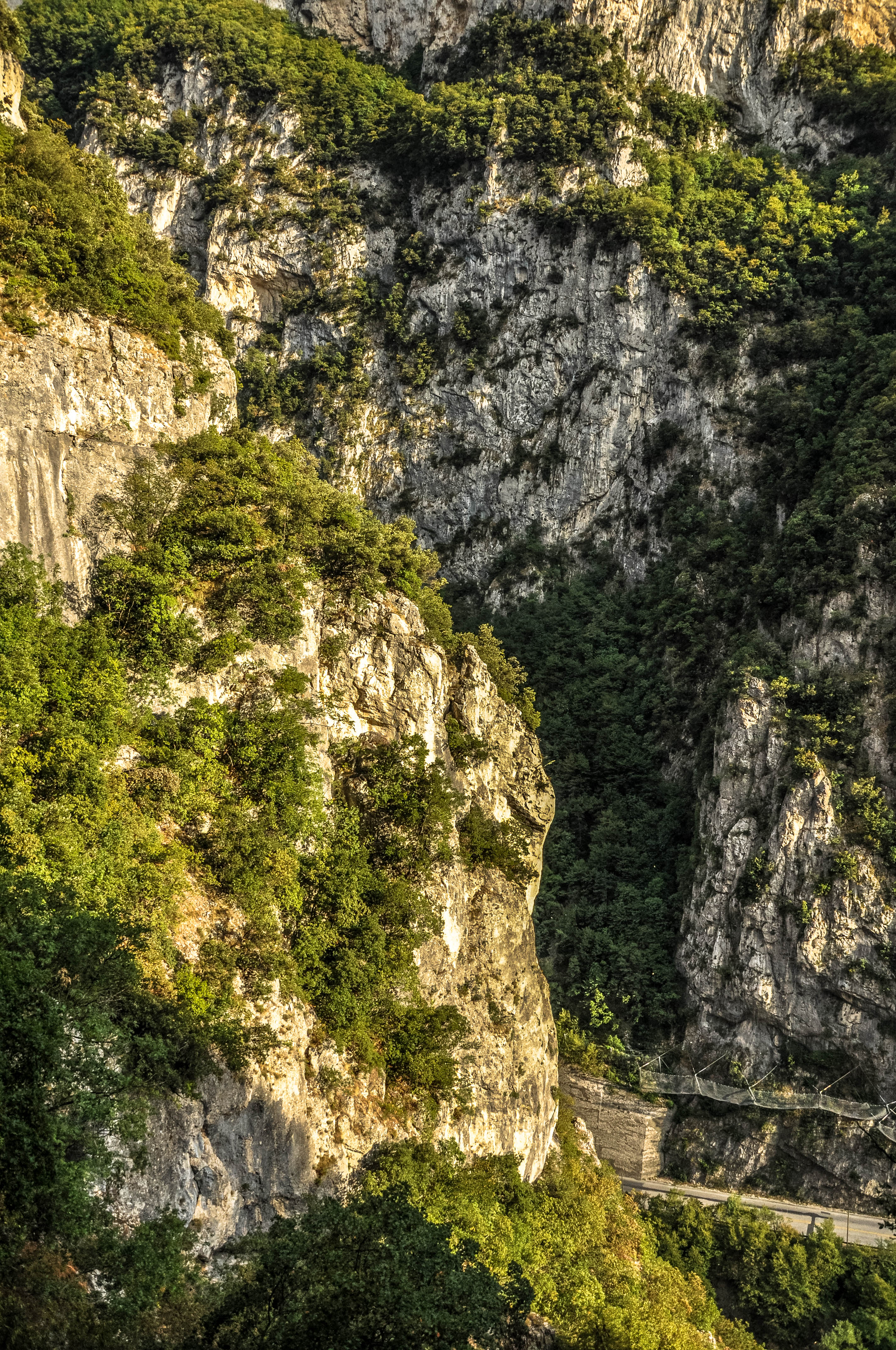 Bosco di Frasassi This is a photo of a monument which is part of cultural heritage of Italy. The authorisation for taking photos of this object was provided by the World Wide Fund for Nature Italy.